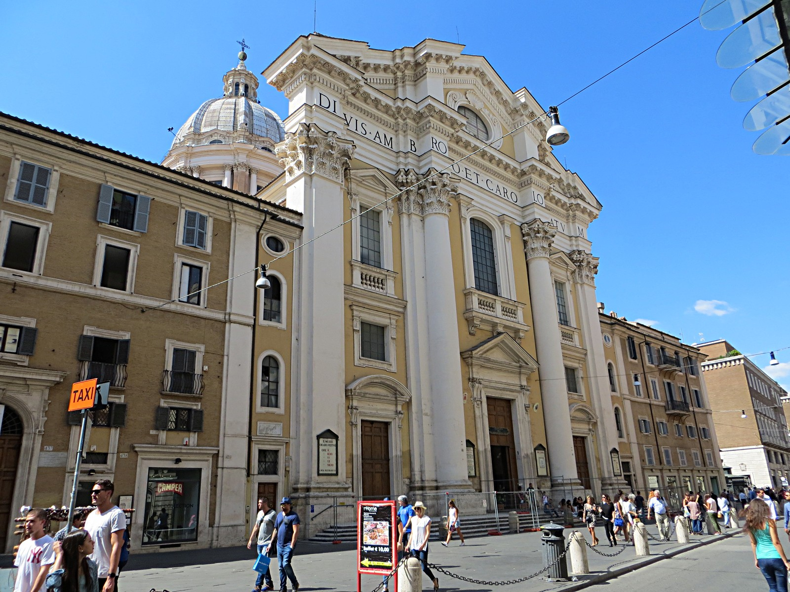 Via del Corso - San Carlo al Corso